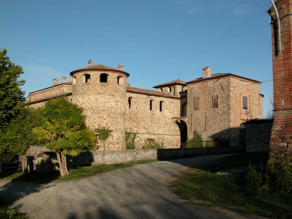 Foto mia personale, la rocca del castello di Agazzano, 2007